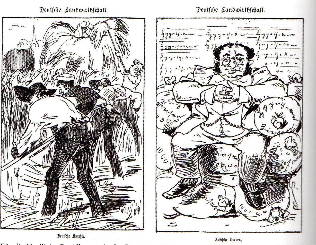 Karikatur aus der antisemitischen Wochenschrift "Die Wucherpille" um 1883